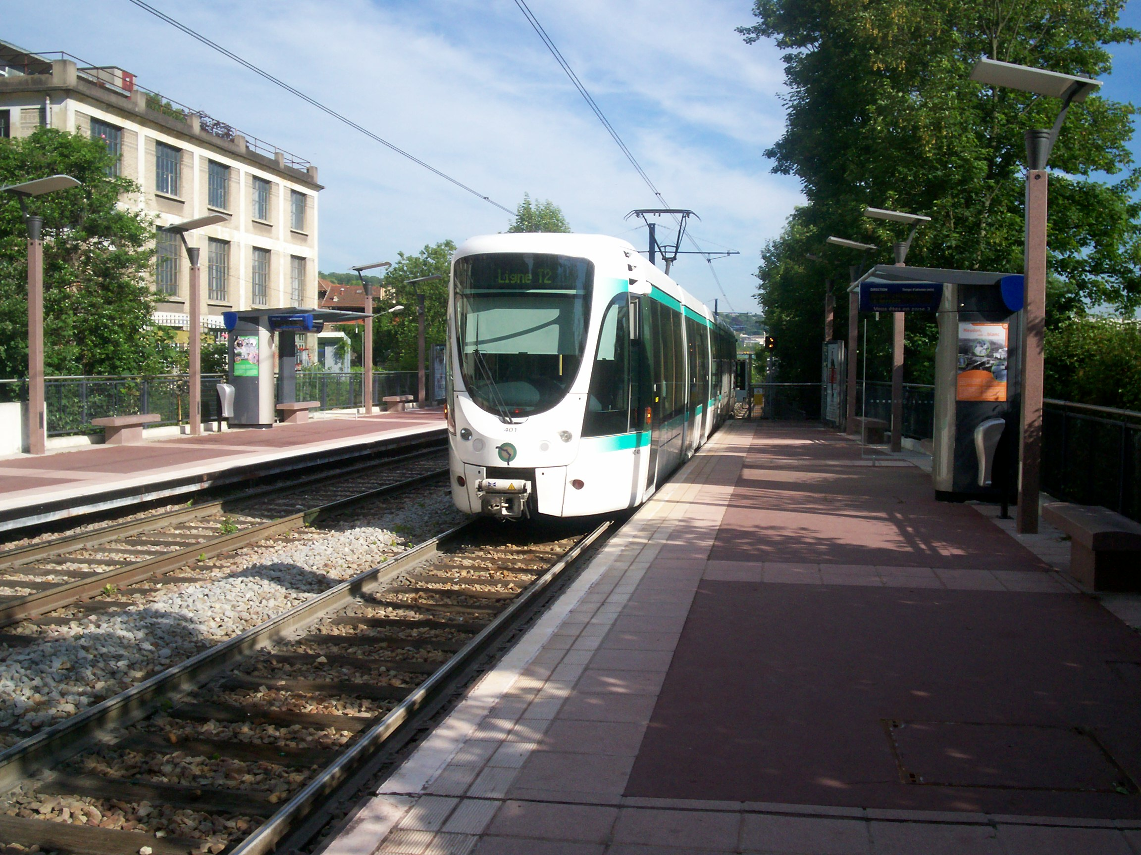 Paris Tramway T2